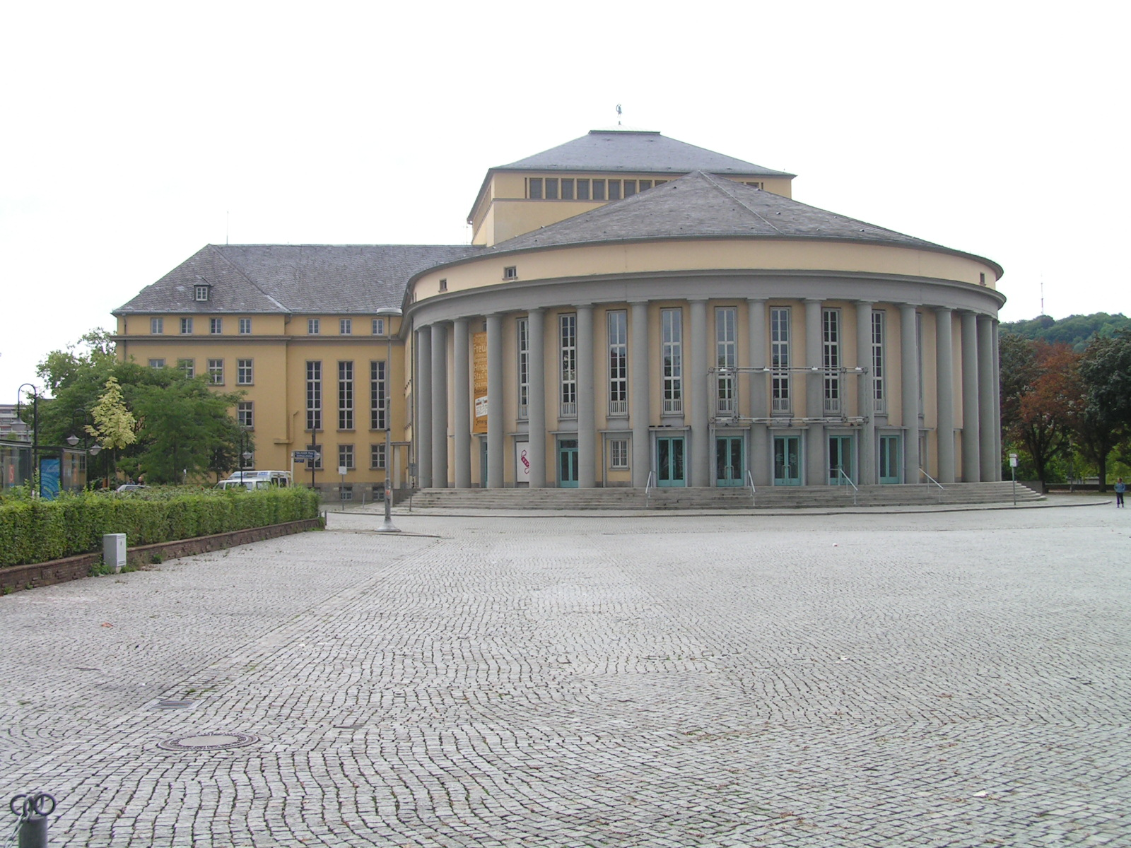 Saarbrücken - Staats Theater